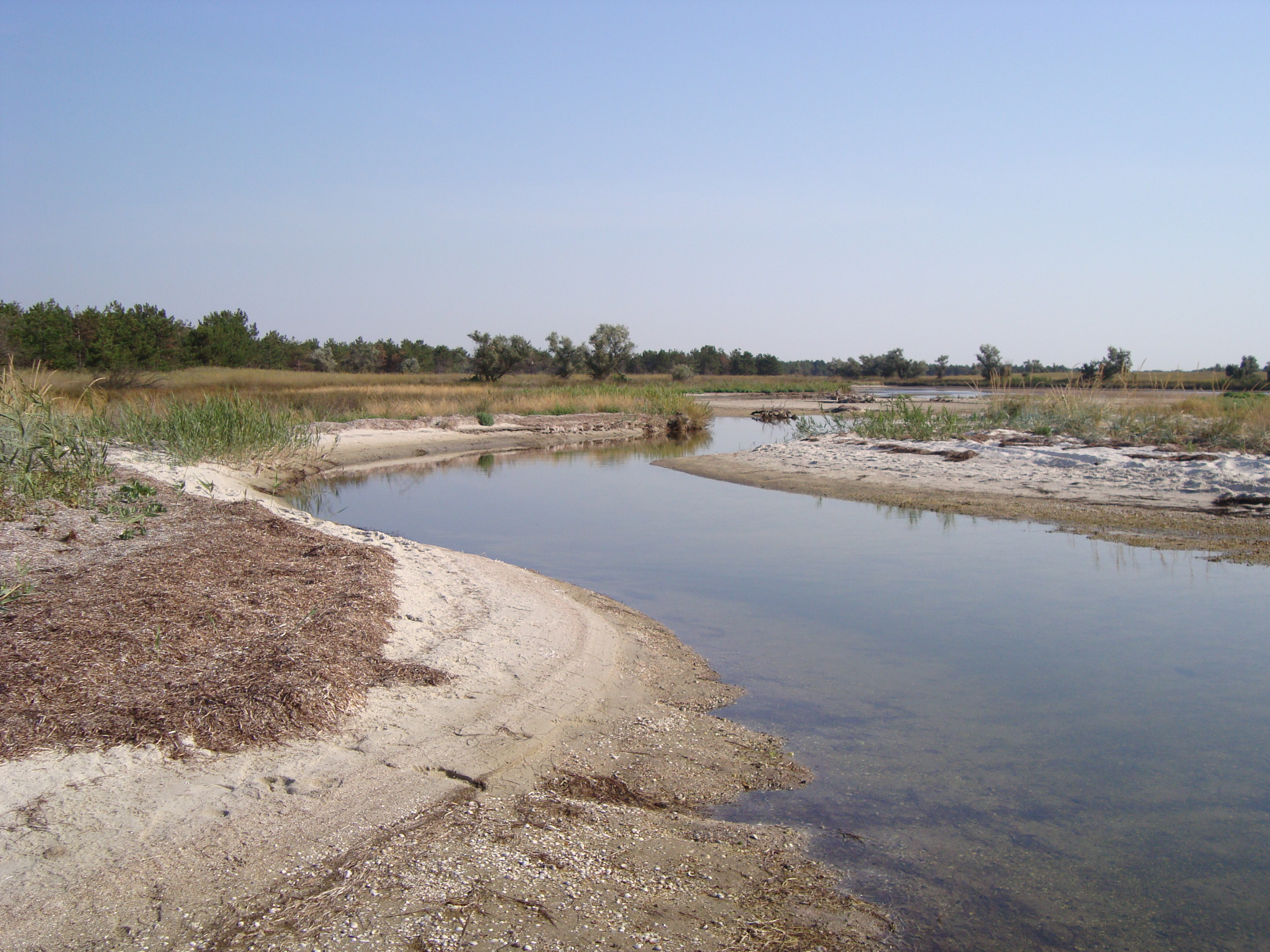 «Кінбурнська коса», Очаківський р-н